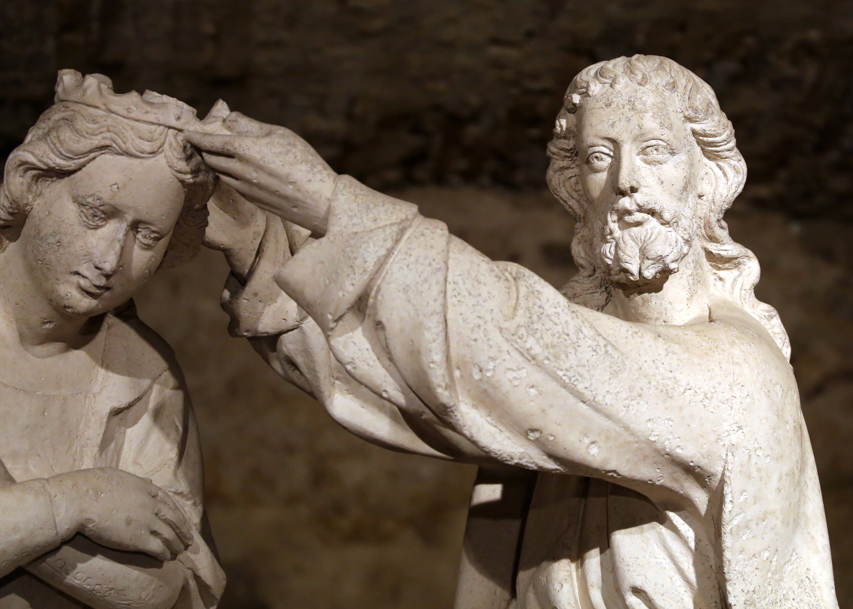 Piazza Santa Maria Maggiore This is a photo of a monument which is part of cultural heritage of Italy.